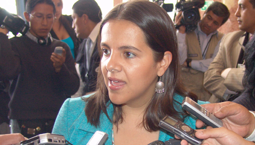 Asambleísta María Paula Romo